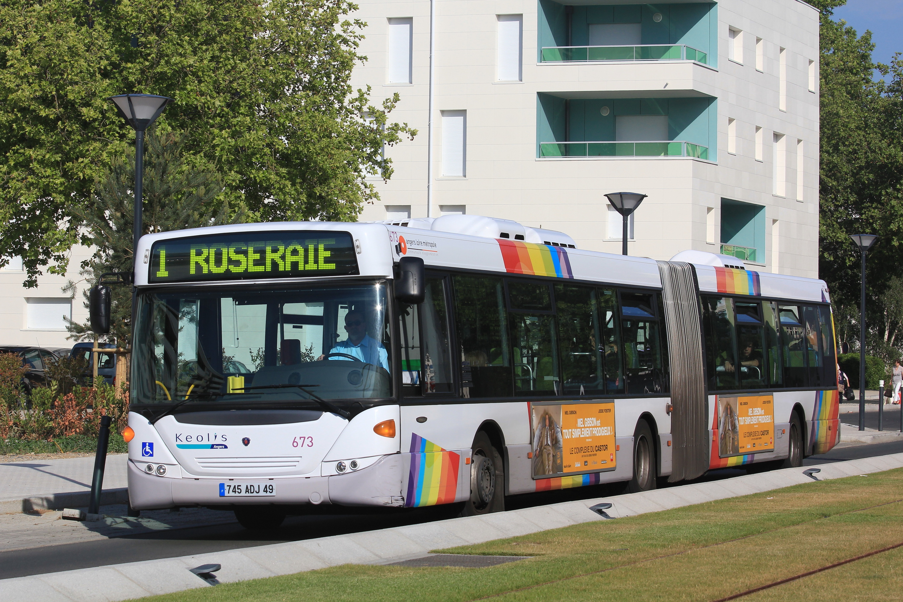 Le bus Scania Omnicity articulé n°673 sur l'avenue Jean XXIII, dans le quartier de la Roseraie à Angers